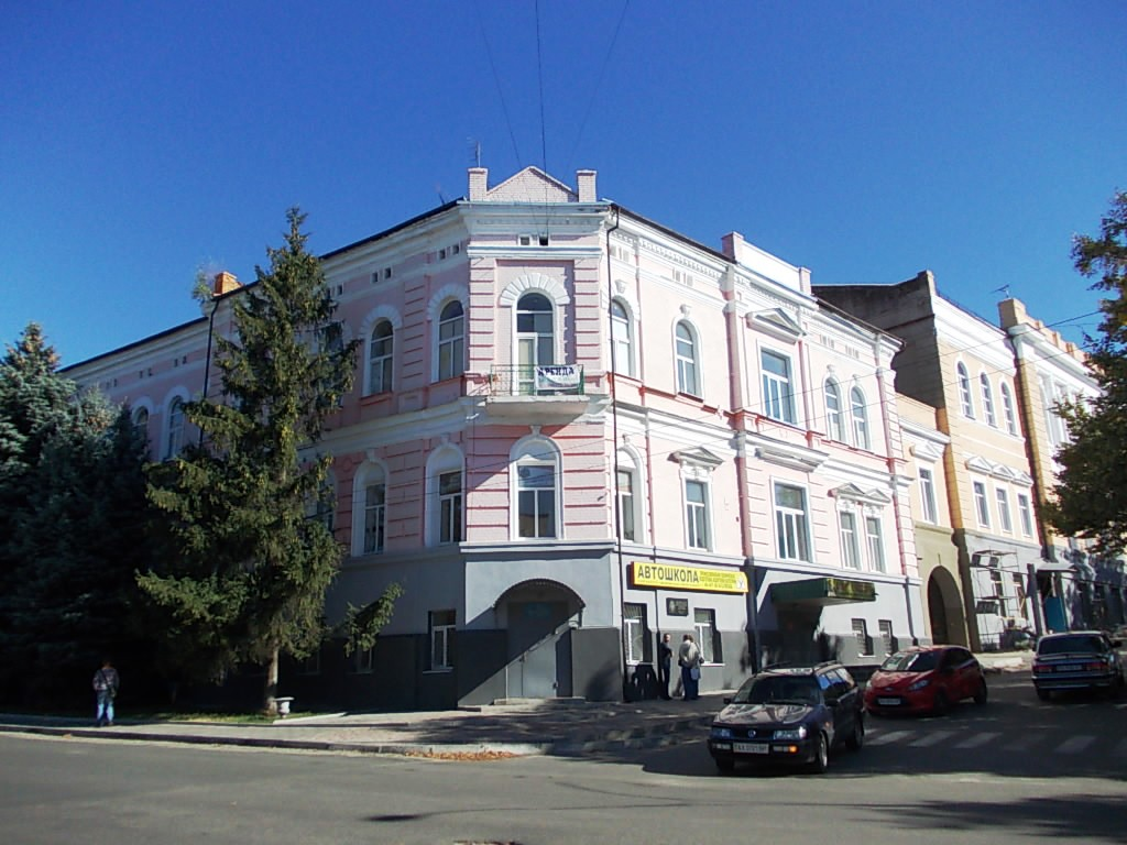 Комплекс будівель духовного училища (сучасне використання — типографія), Куп'янськ, вулиця 1 Травня, 2